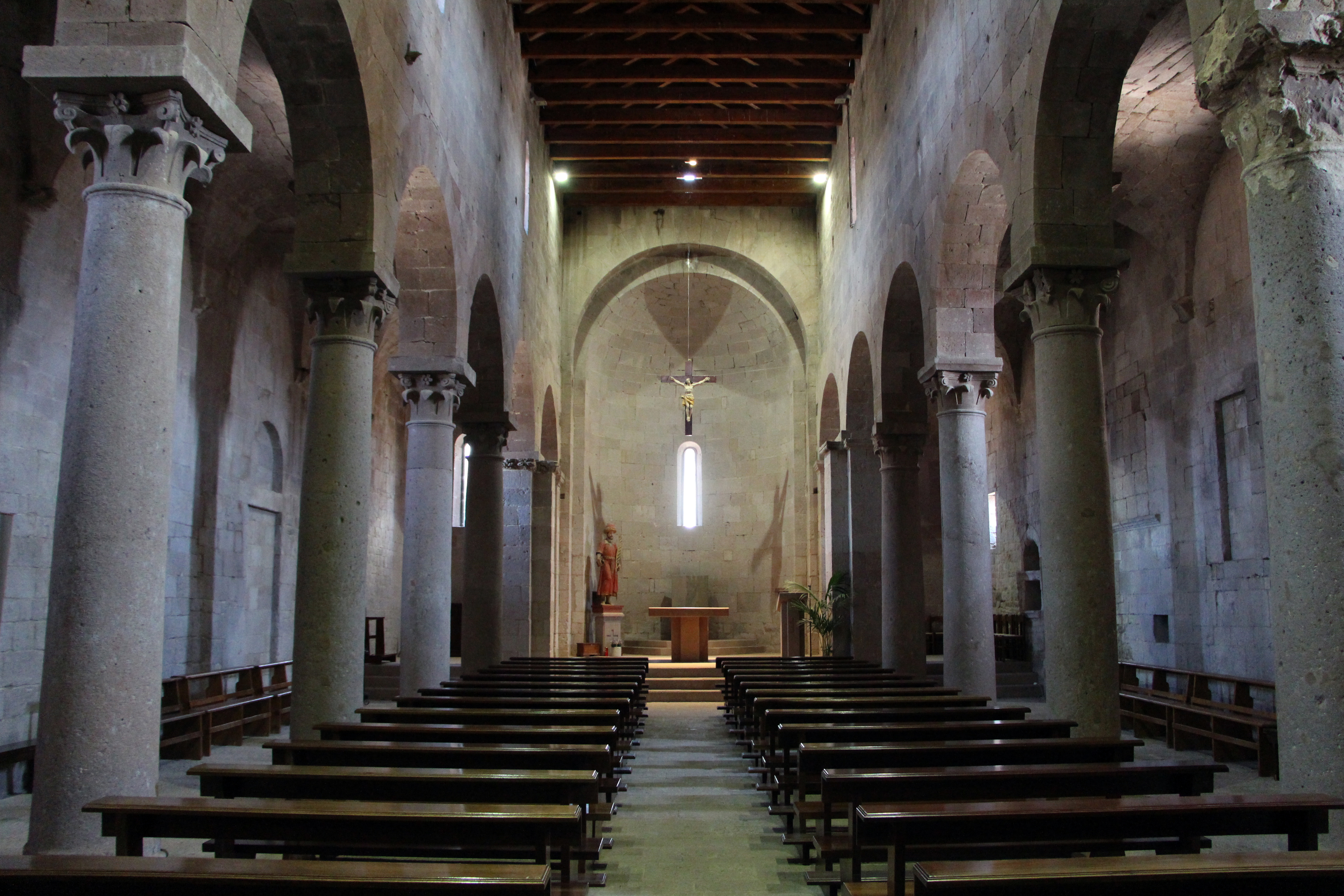 Sant'Antioco di Bisarcio (Ozieri)